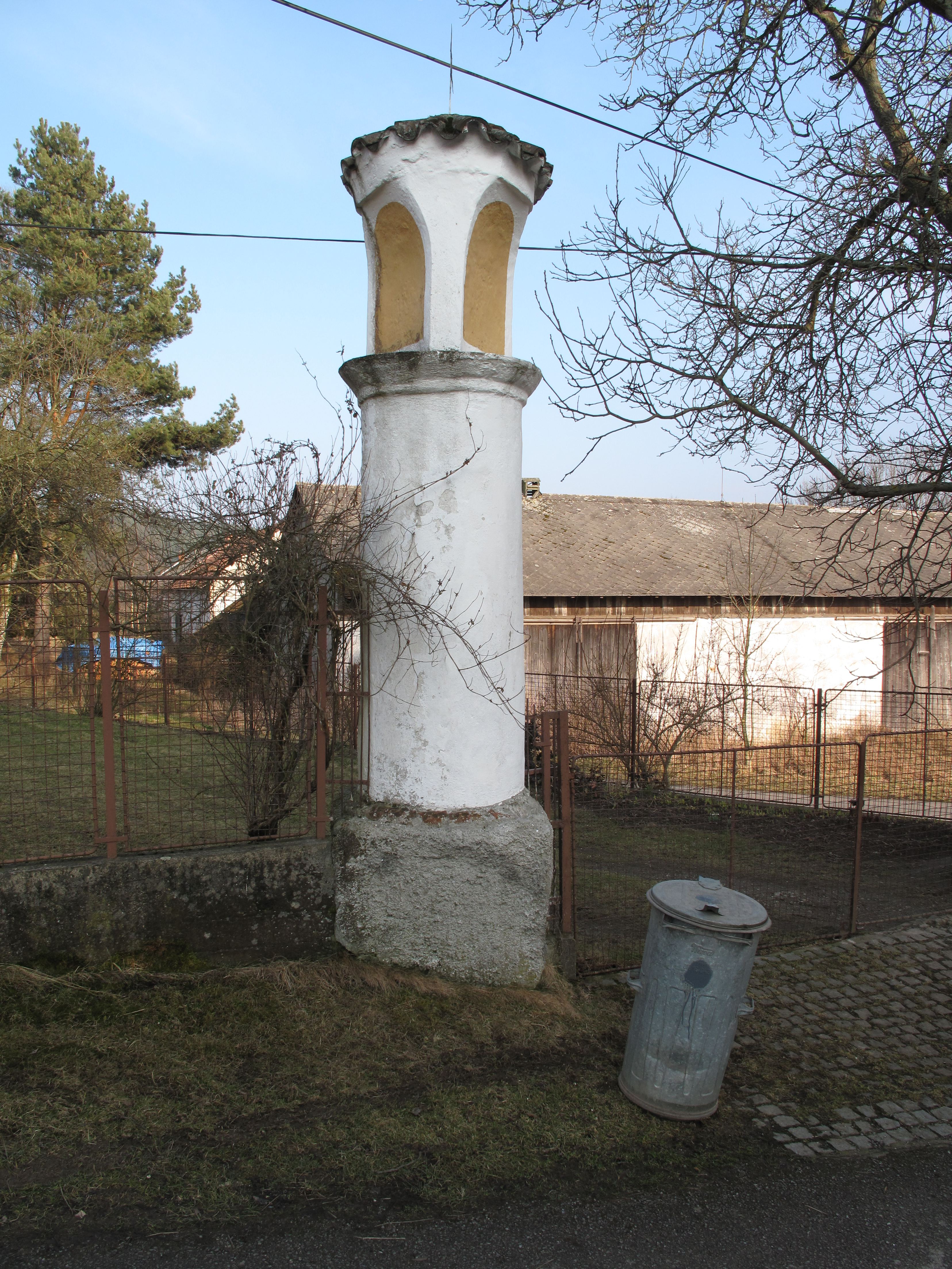 Sloup v Zálezlech. Okres Prachatice, Česká republika.